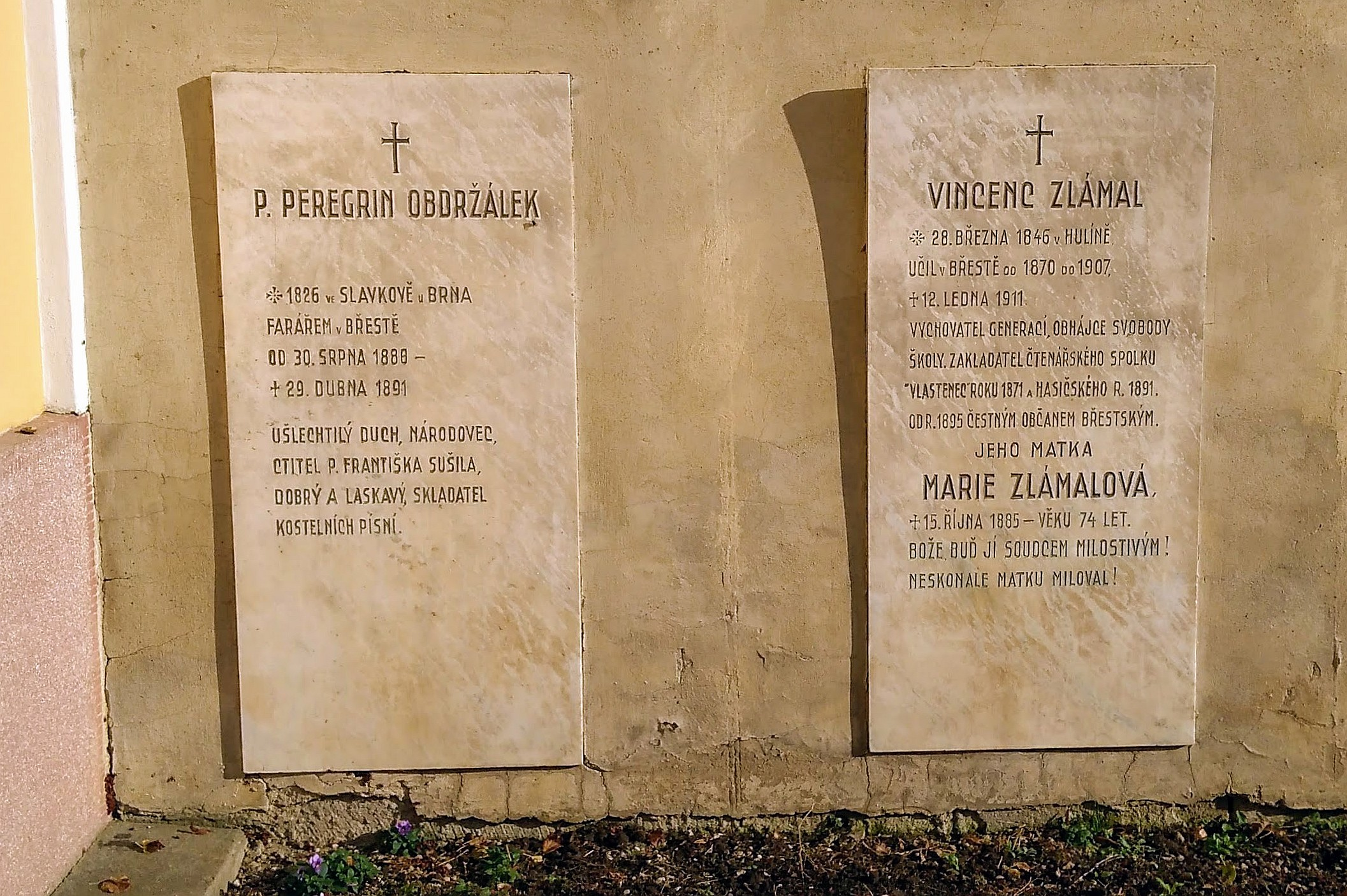 Peregrin Obdržálek (1825-1891), epitaf hřbitov Břest